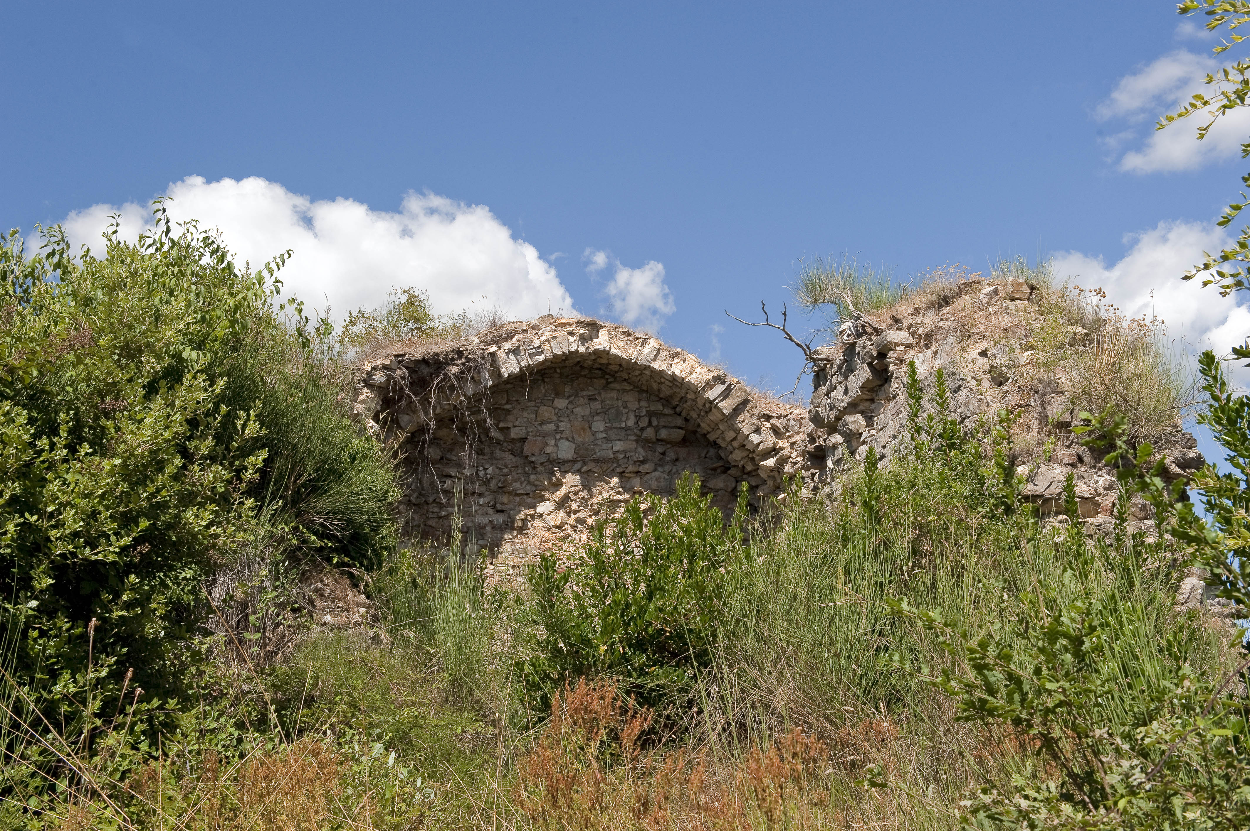 Interno delle mura di cinta del Castello di Monternano (Castellina in Chianti)